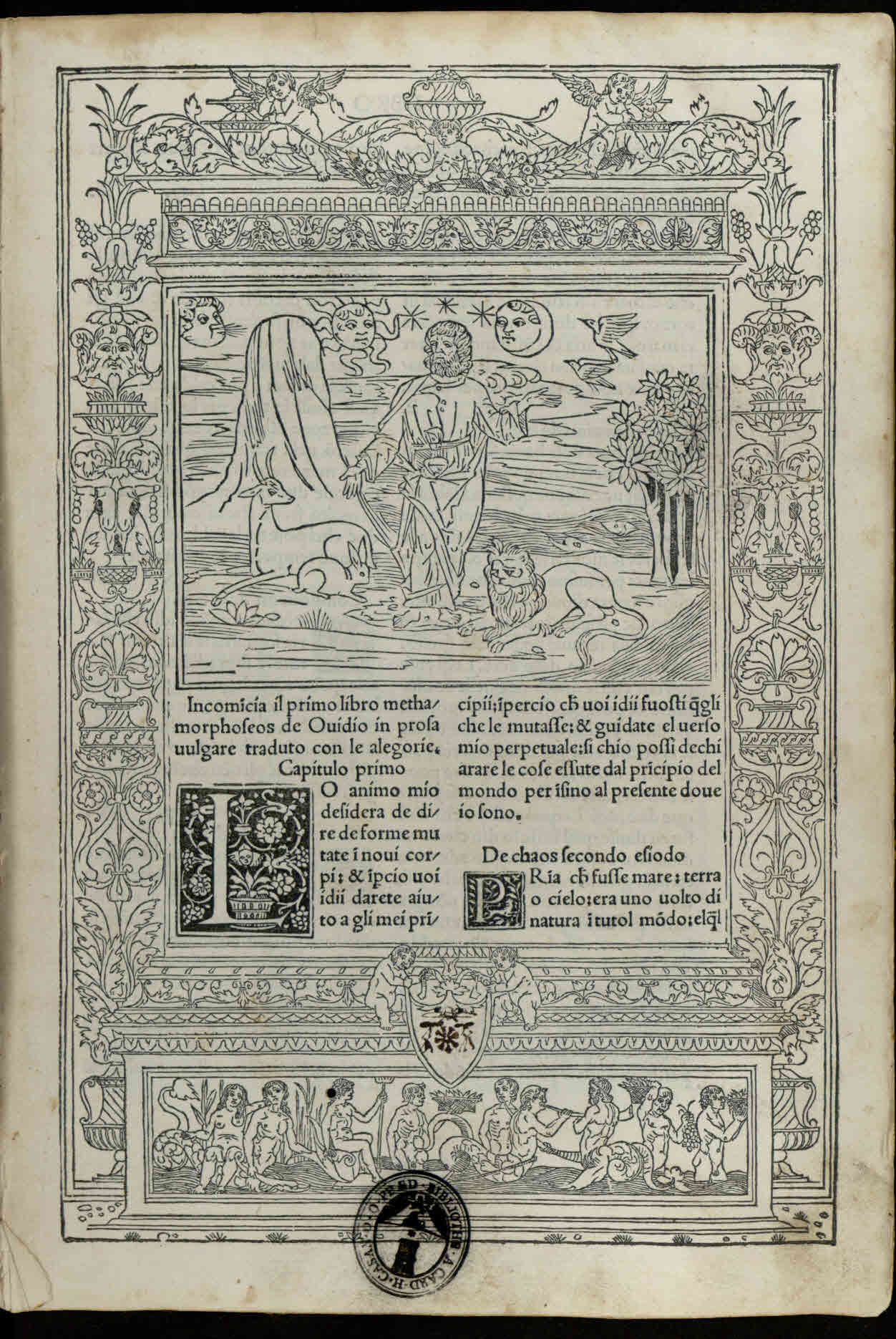 Metamorphoses (italiano). - Stampato in Venetia : per Zoane Rosso Vercellese ad instantia del nobile homo miser Lucantonio Zonta fiorentino, del MCCCCLXXXXVII Adi X del mese di aprile. - 146 c. ; [*]4, a-r⁸, s⁶ ; fol. - Marca tipografica nell'explicit .